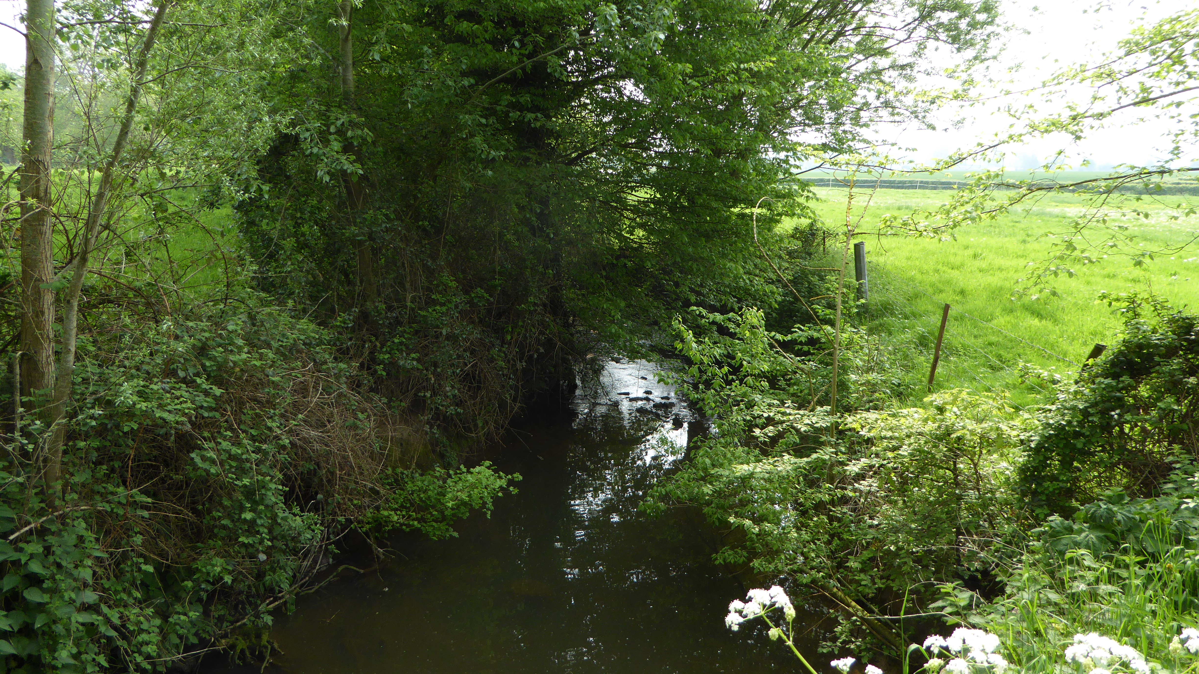 Le ruisseau de la Grande Steenbecque, qui traverse la ZNIEFF 310013315, à Morbecque (Nord, France)